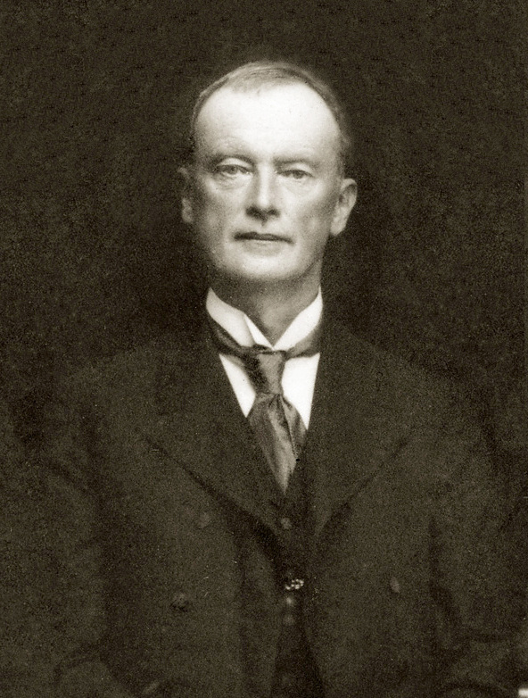 Stanislovas Narutavičius. One of the signatories of Lithuanian independence act. Stanisław Narutowicz. Prawnik, litewski działacz niepodległościowy, brat Gabriela. Stanislovas Narutavičius. Lietuvos politinis veikėjas